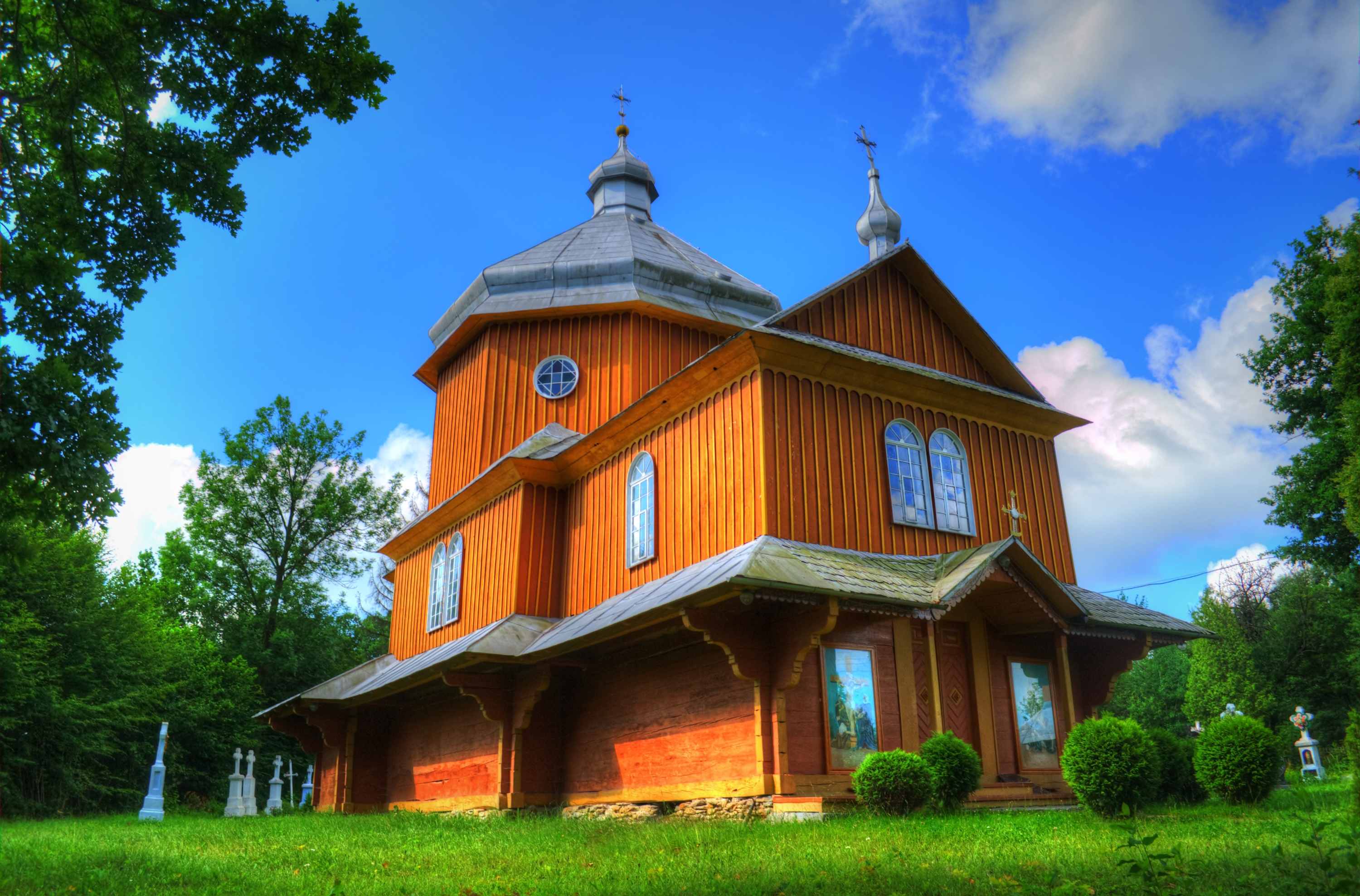 Деревянна Церква 1905 року будівництва в селі Корчівка